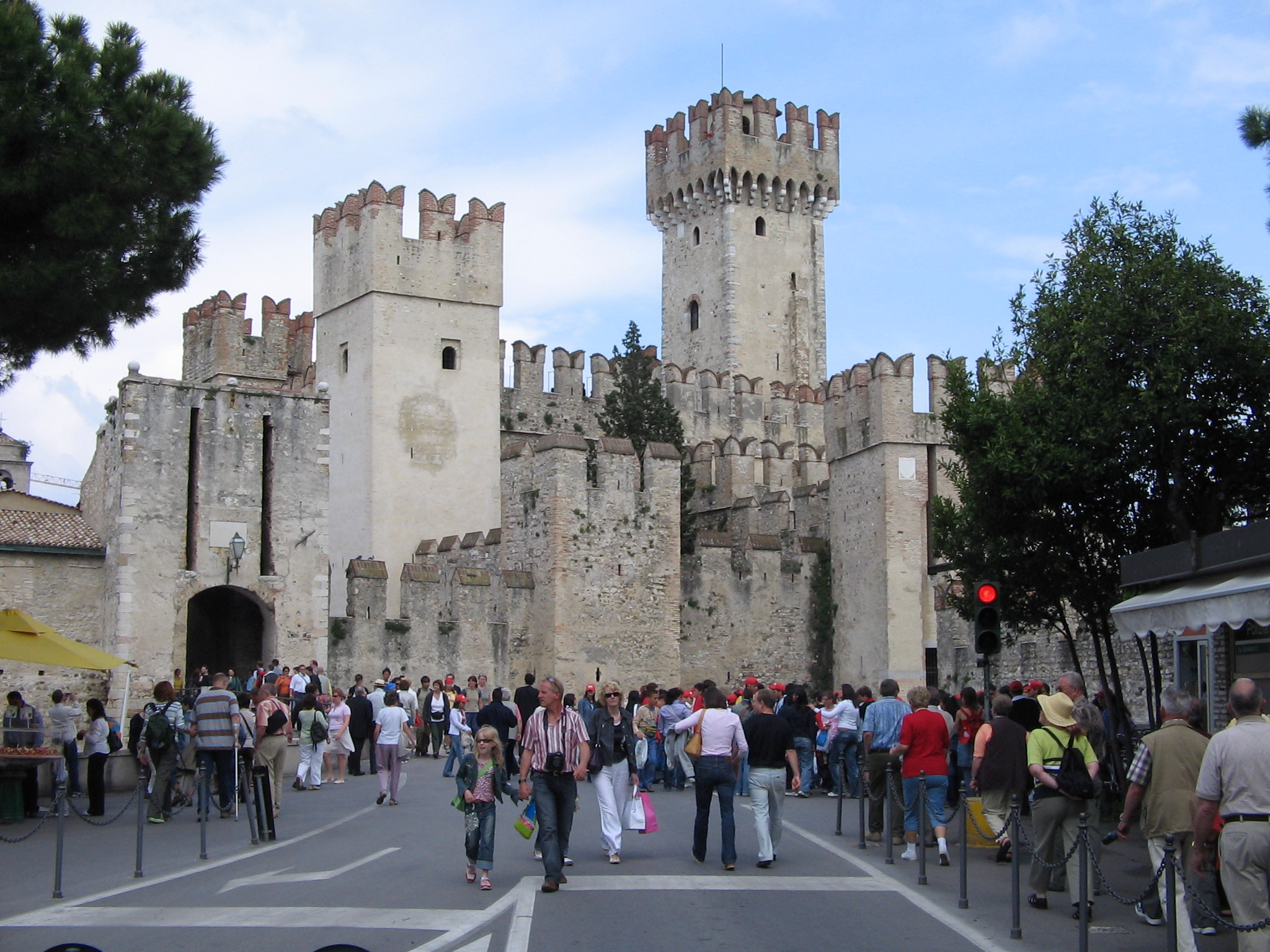 Sirmione